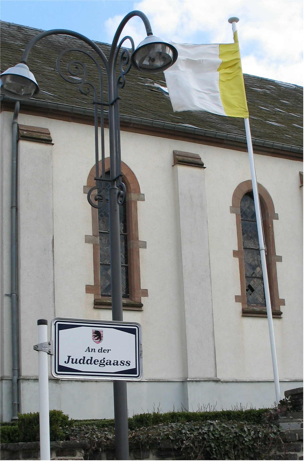 Zu Eschduerf. Kategorie:Gemeng Heischent